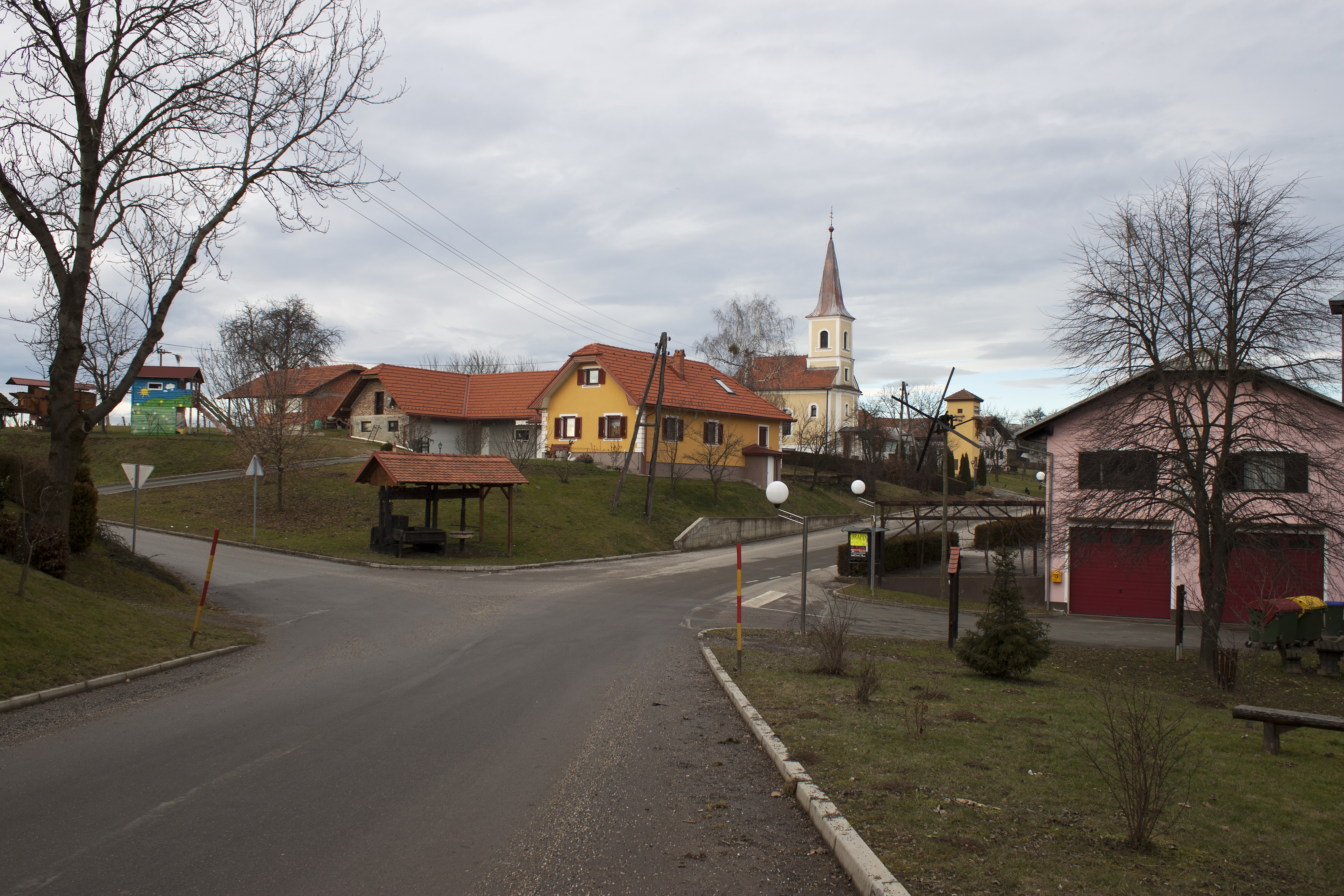 Gerlinci von Südost. Gerlinci (Görhegy) ist eine Ortschaft in der Gemeinde Cankova (deutsch: Kaltenbrunn) in Slowenien und liegt in der historischen Region Prekmurje, unmittelbar an der österreichischen Grenze.